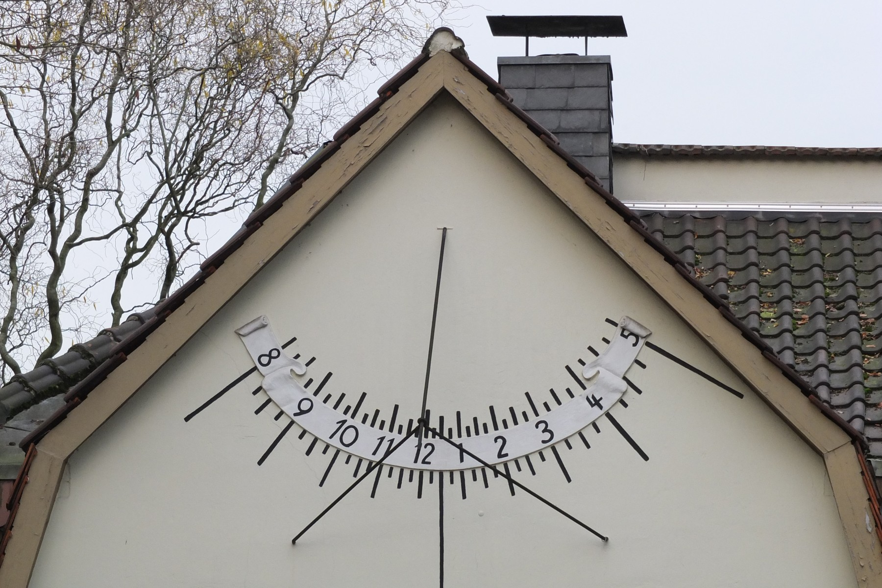 Sonnenuhr am Nebengebäude der ehemaligen Höheren Privat-Knabenschule, Hilden, Kolpingstraße 9-11This is a photograph of an architectural monument.